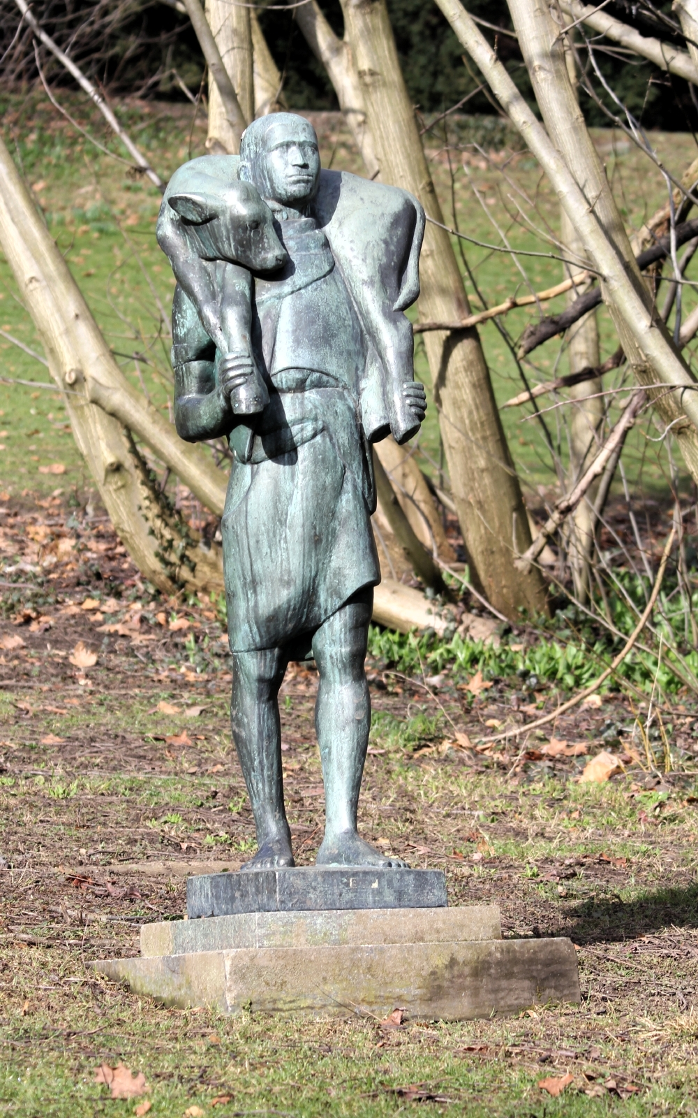 Hirte, Bronze 102 cm. Alice Boner (1889-1981). Standort: Rieterpark, Zürich.